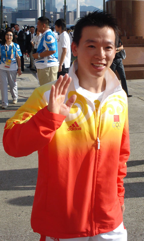 Huang Xu